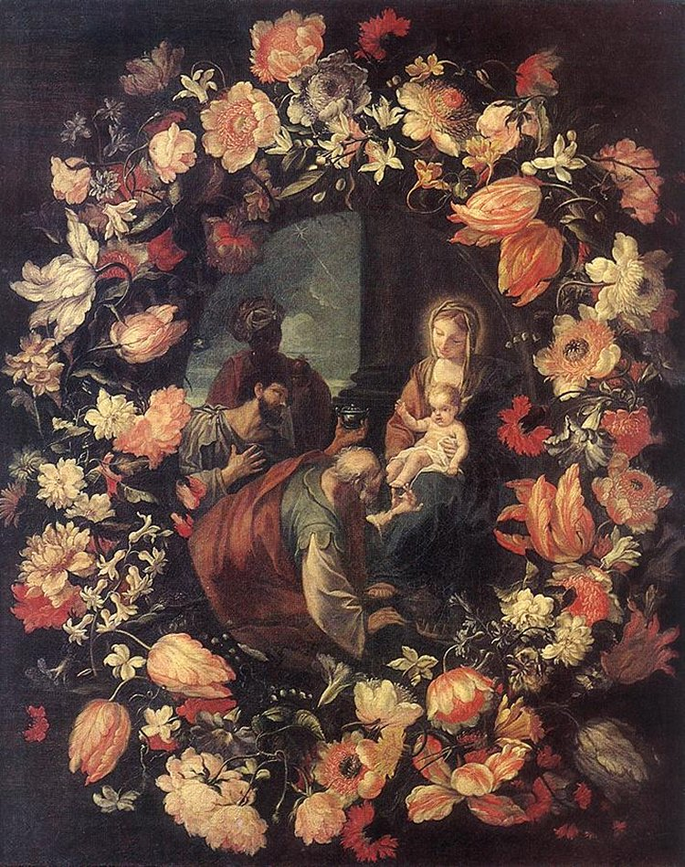 Mario Nuzzi, Adoración de los Magos en una guirnalda de flores, 1654, óleo sobre lienzo, 75 x 61 cm. San Petersburgo, Museo del Ermitage.